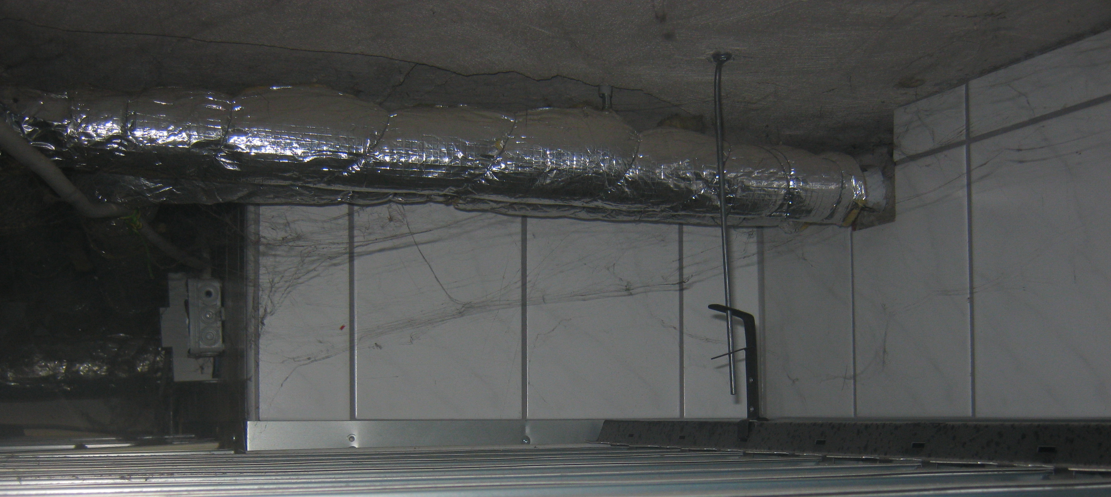 Blick unter die Decke der Festhalle Busenbach - Google Maps - Google Earth